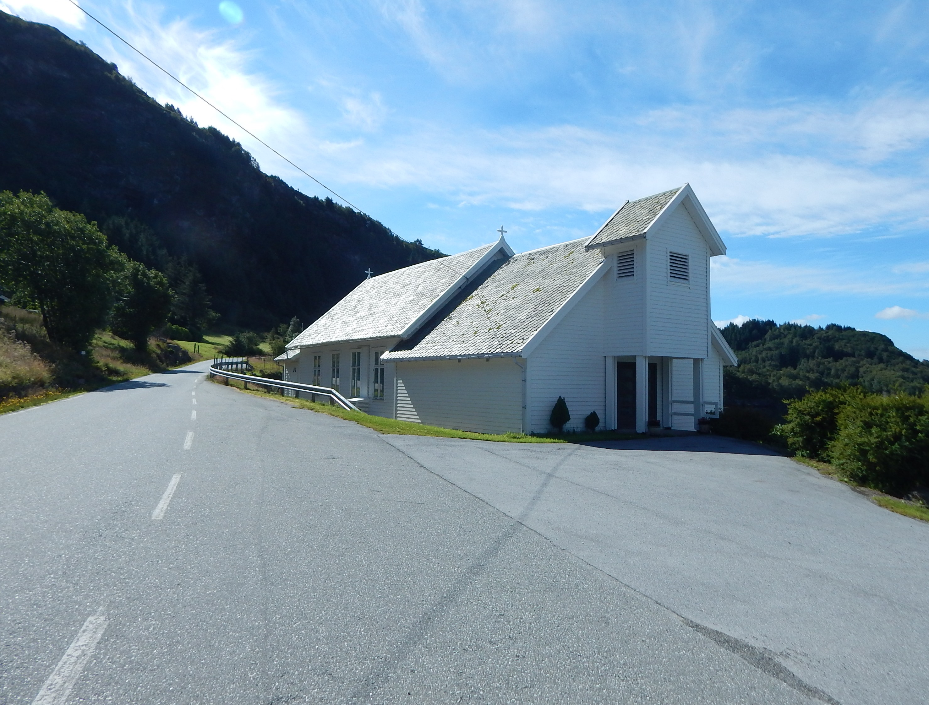 Folkestad bedehus i Fjaler med fylkesvei 65 foran